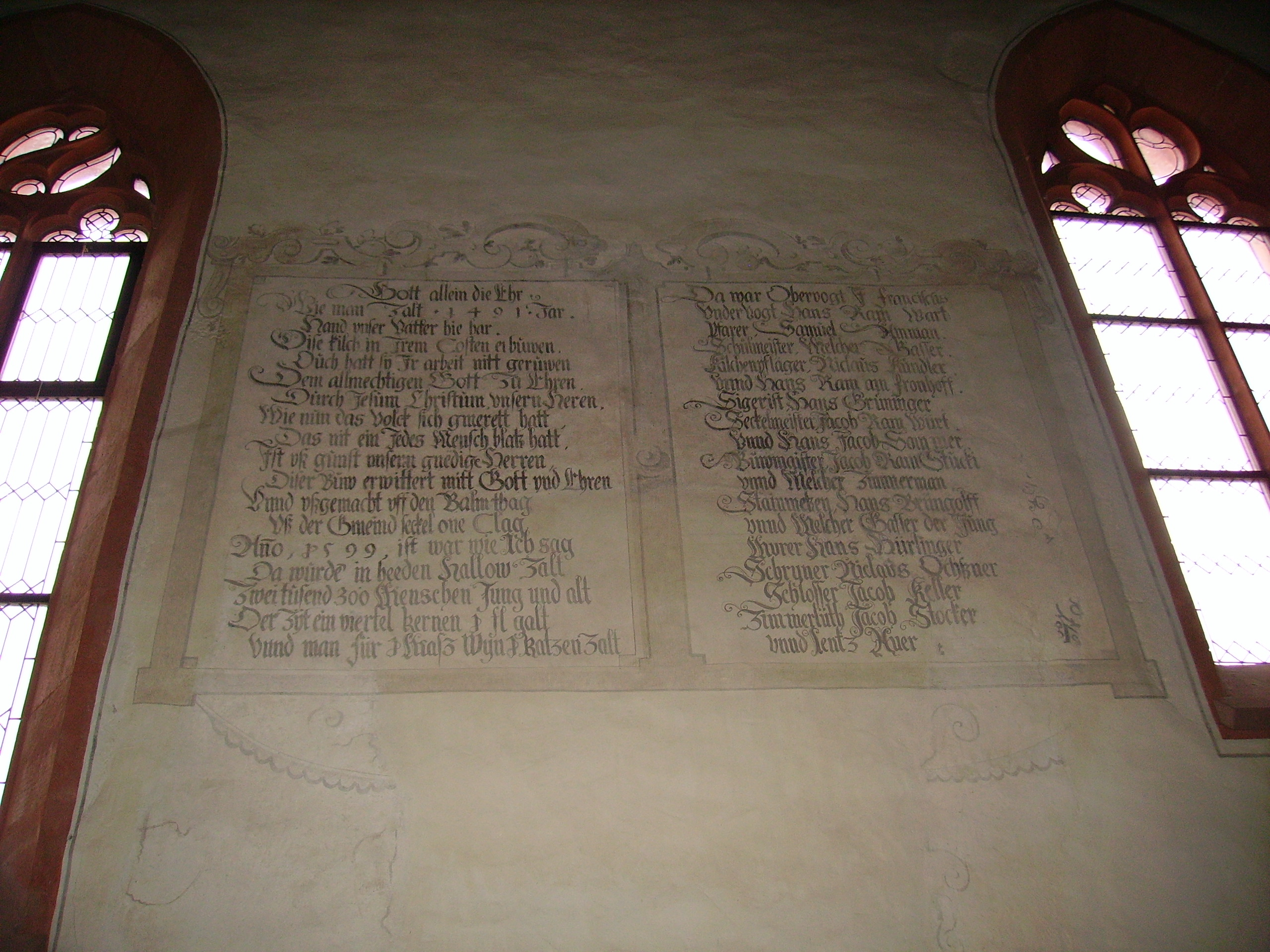 Inschrift von 1599 an der inneren Südwand der Bergkirche St. Moritz in Hallau, Kanton Schaffhausen